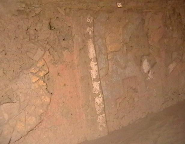 Multicoloured alto-relievo in Garagay archaelogical site in Lima, Peru.